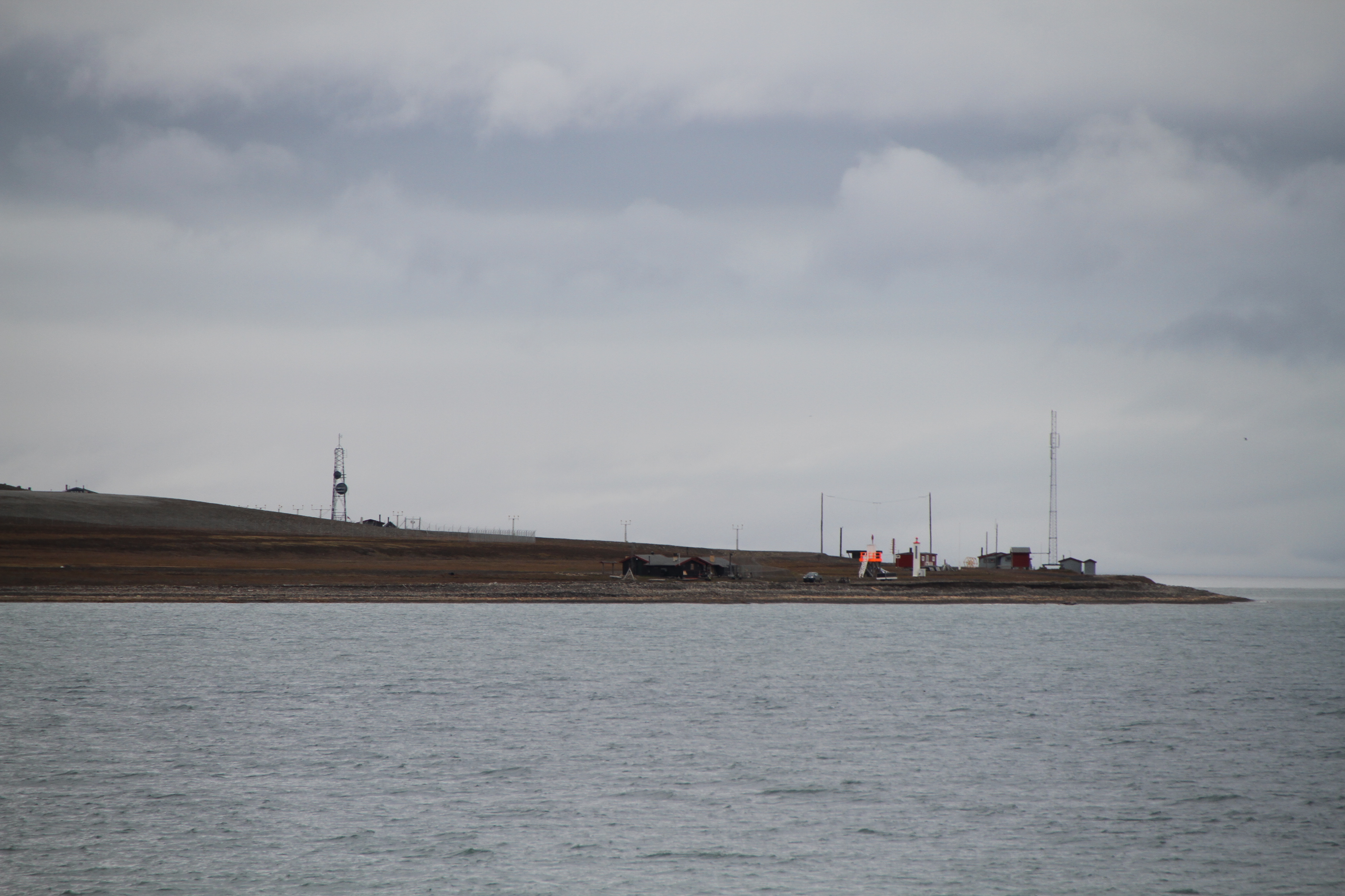 Vestpynten sea beacon point, Longyearbyen (Hotellneset), Svalbard